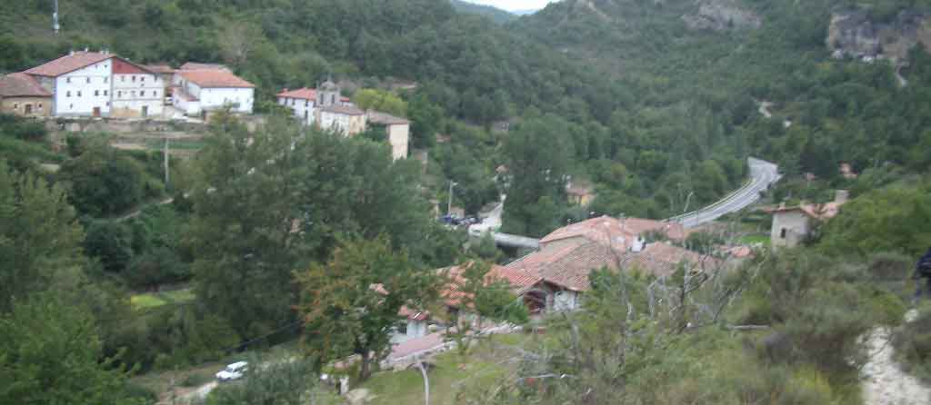 Atauri